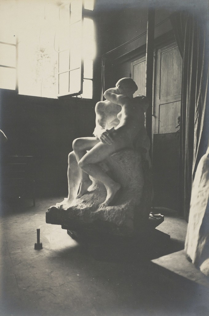 Le Baiser par Rodin en marbre dans l’atelier du Dépôt des marbres de Jean Turcan (The Kiss in marble in the Dépôt des marbres studio), c. 1898